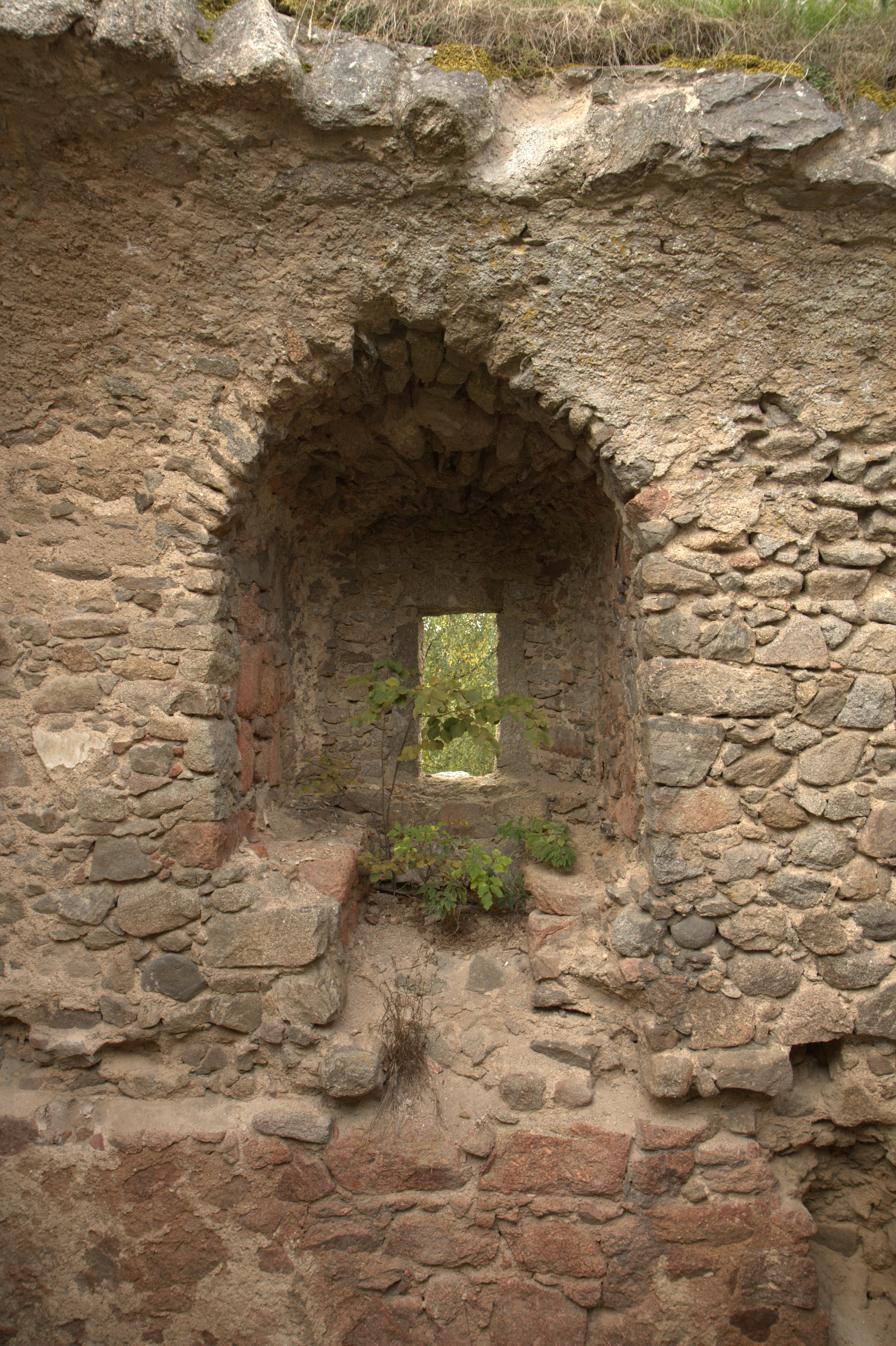 Stichbogige Fensternische mit Sitzbänken in der Burgruine Lobenstein